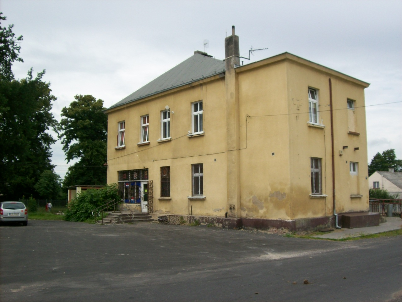 Dwór w Kruszy Podlotowej